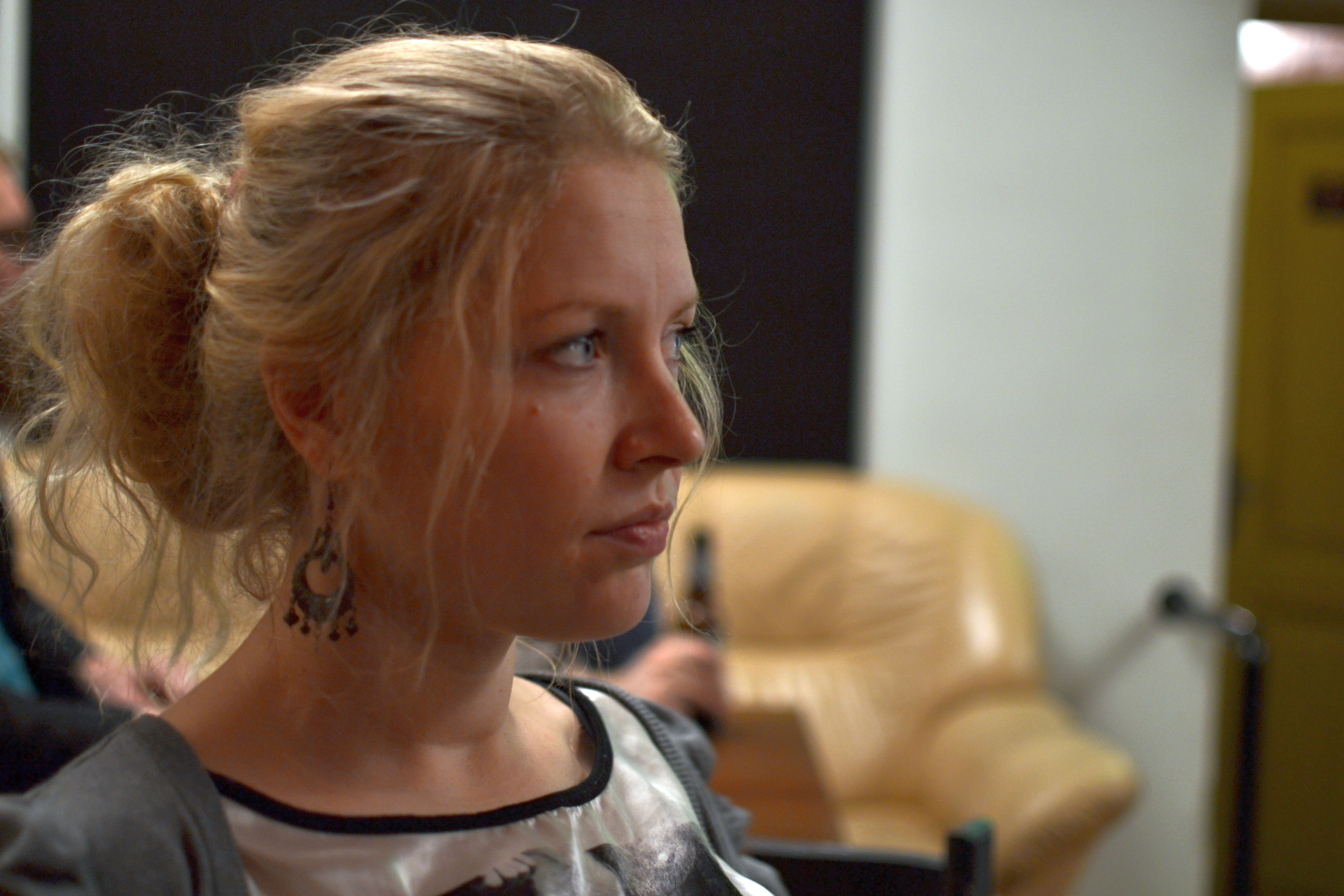 Kirjanduskriitik Piret Põldver